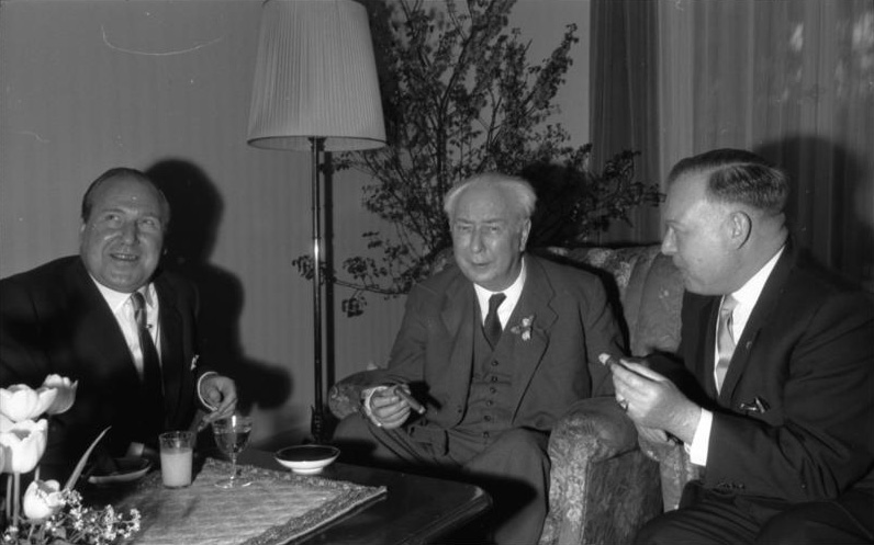 Pressekonferenz- Deutsches Müttergenesungswerk im Haus des Bundespräsidenten